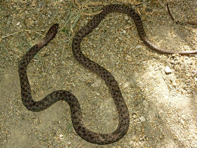 Dolichophis schmidti Nouvelle version de Dolichophis schmidti04.jpg ; contraste, luminosité...